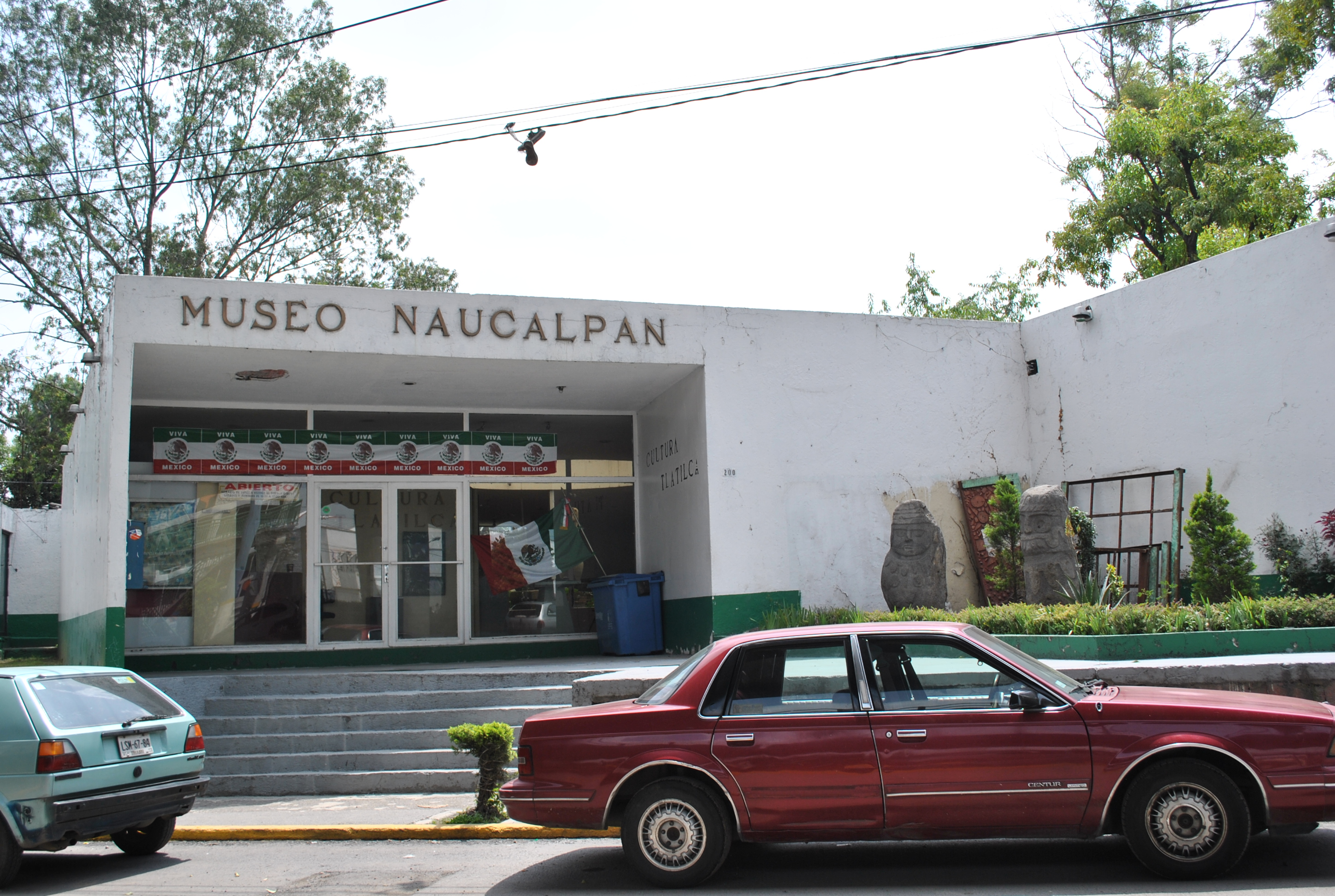 Museo de la Cultura Tlatilca, Naucalpan, Estado de México.